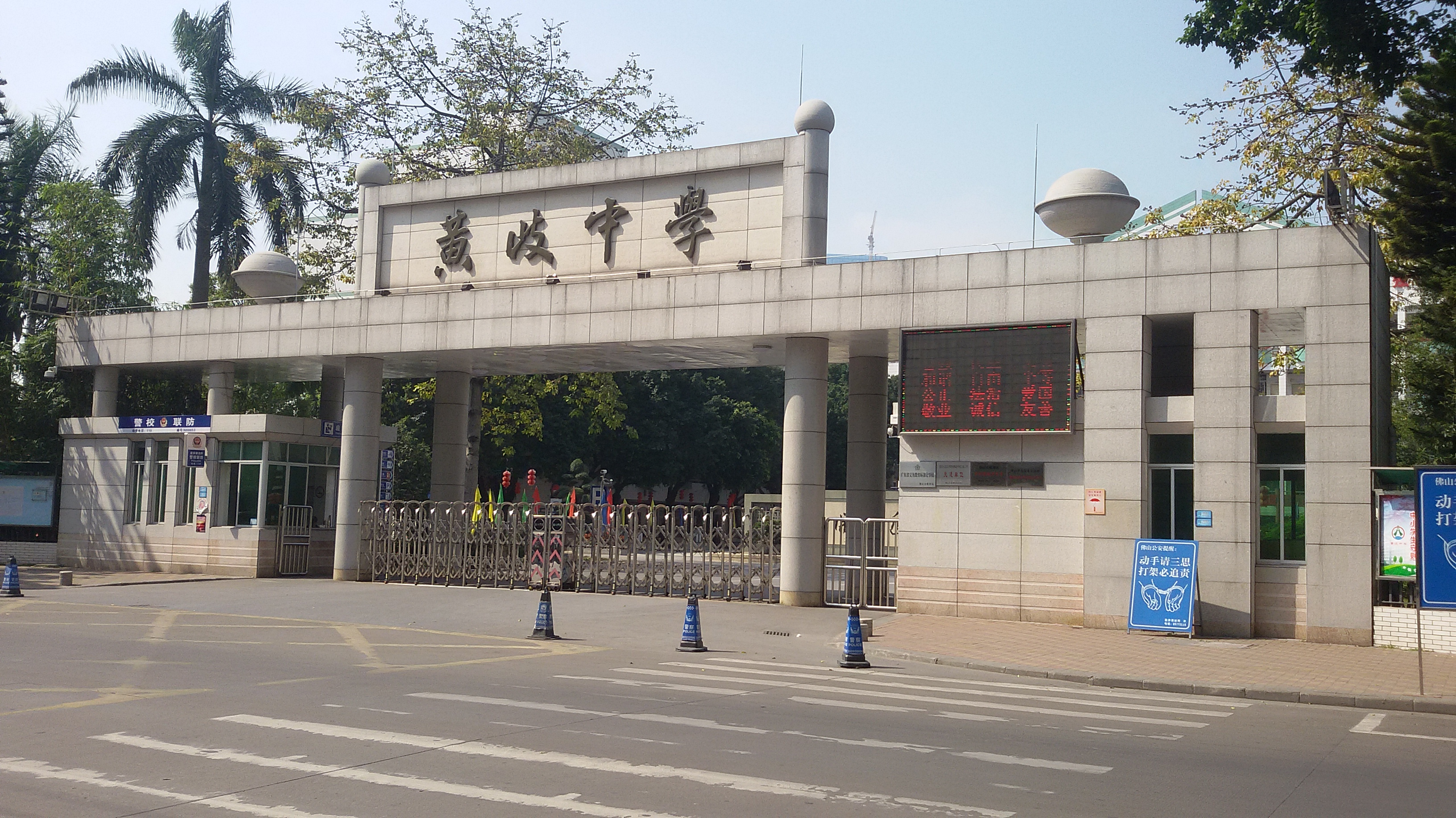 粵語: 南海區黃岐中學